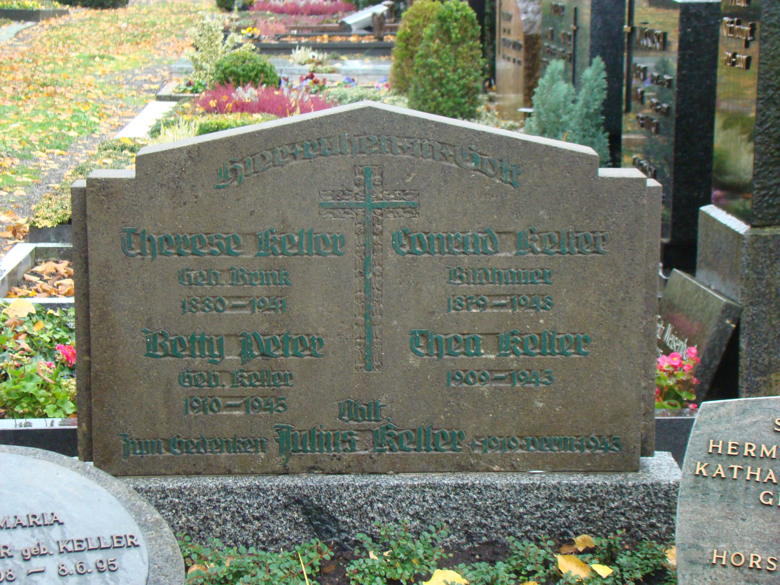 Grabstein des Bildhauers Conrad Keller und seiner Familie in Wiesloch